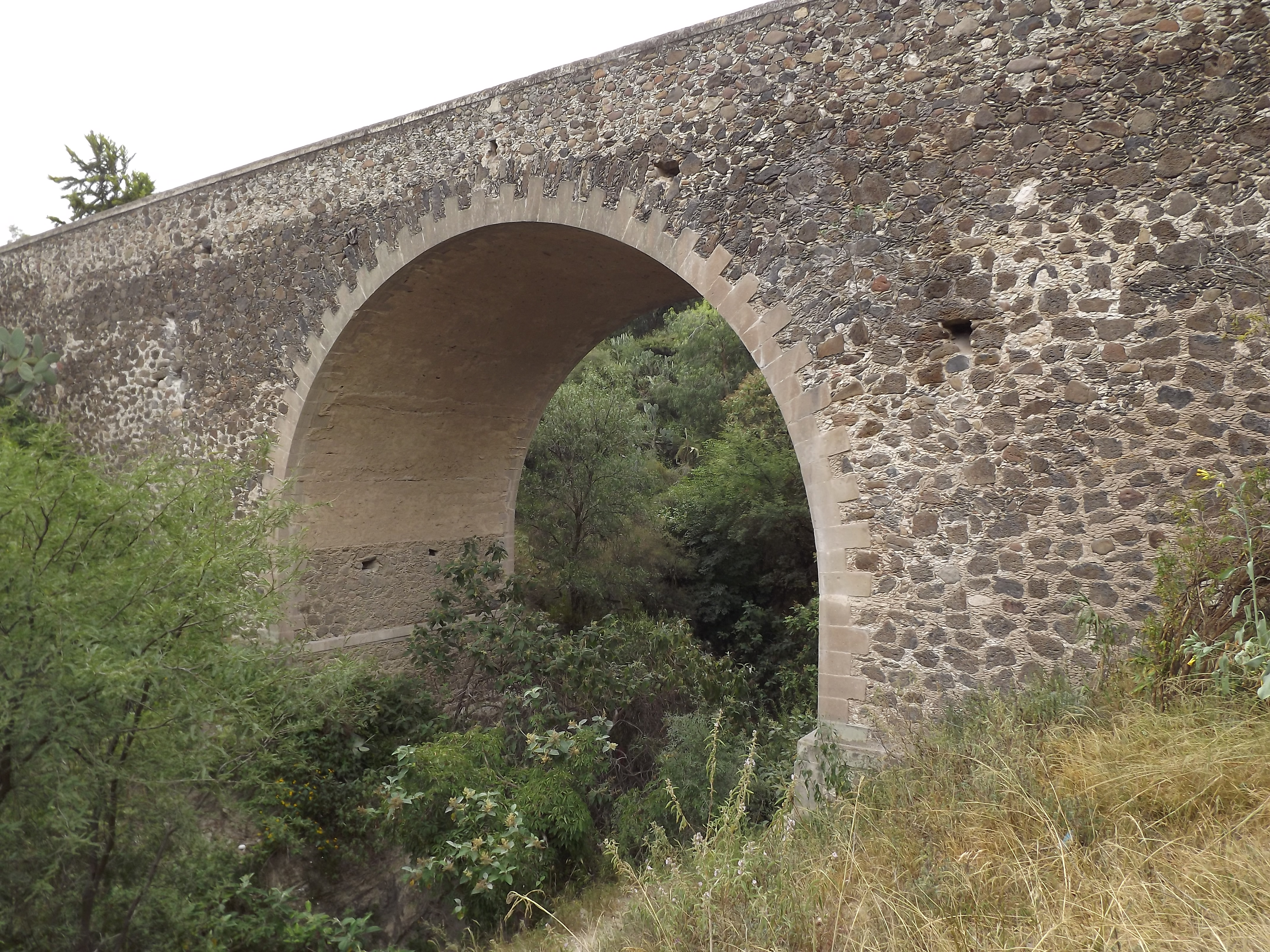 Puente la Colmena también denominado Puente Quita Calzón, localizado en Santiago Tlautla, municipio de Tepeji del Río de Ocampo, Hidalgo; este puente forma parte del “Tramo del Camino Real entre el puente de La Colmena y la antigua Hacienda de La Cañada” uno de los sesenta sitios declarados Patrimonio de la Humanidad bajo la denominación de el Camino Real de Tierra Adentro.